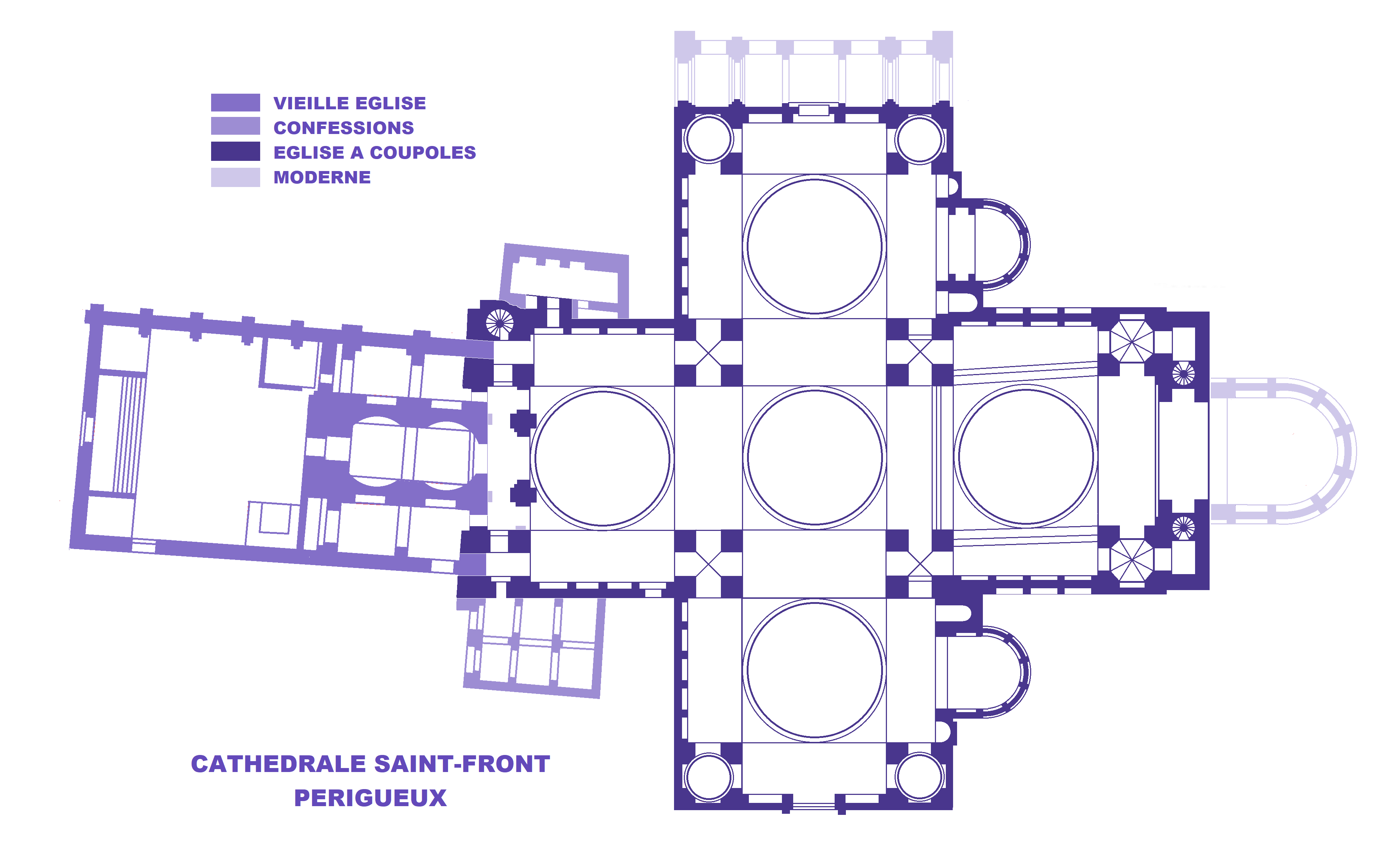 Cathédrale Saint-Front de Périgueux, plan